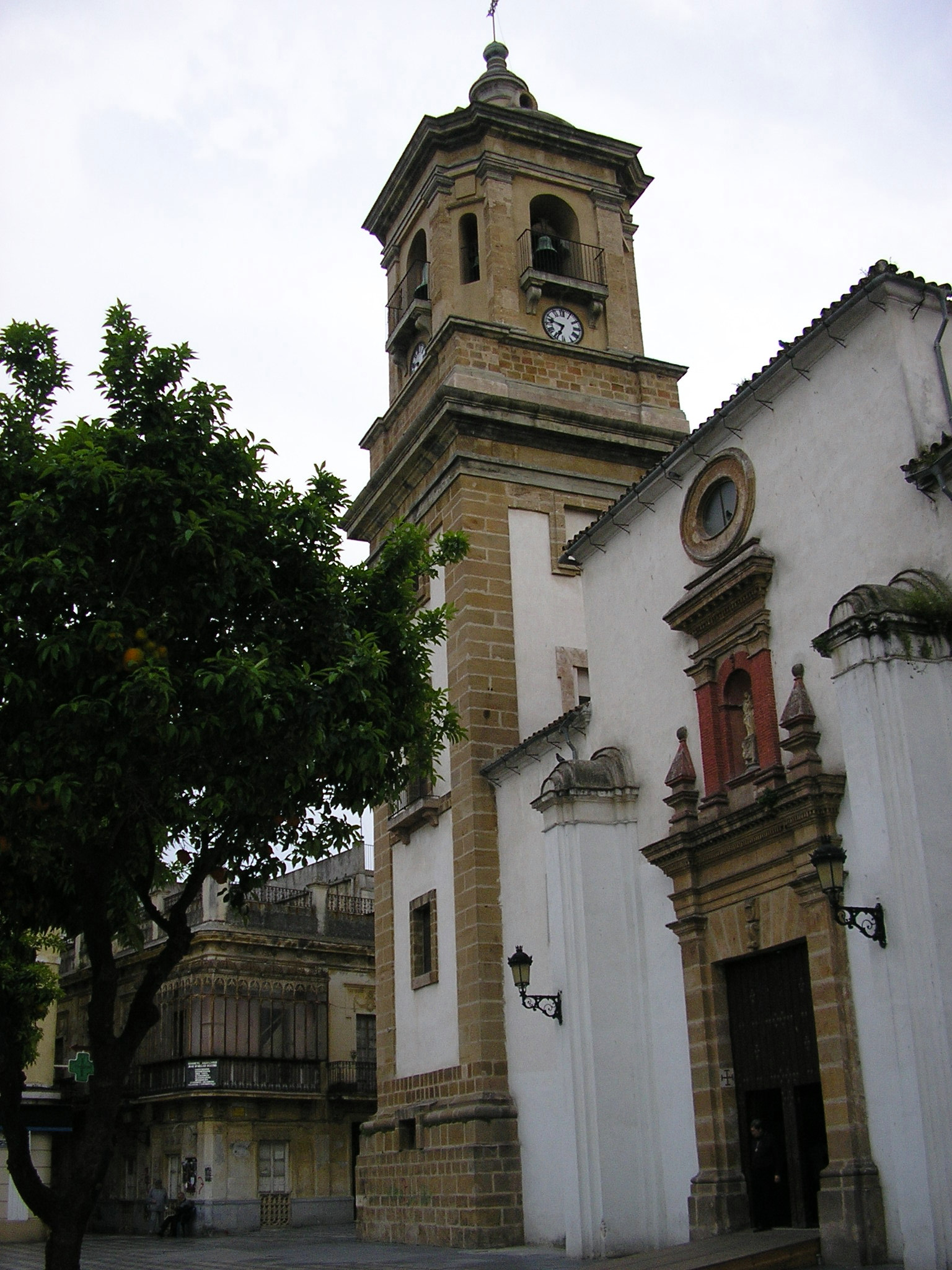 Iglesia de la Palma en la localidad andaluza de Algeciras (España)